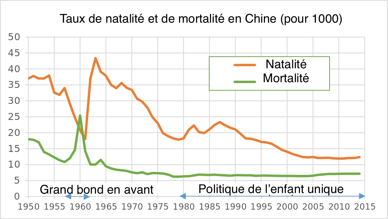 Traduction en français du graphique anglais